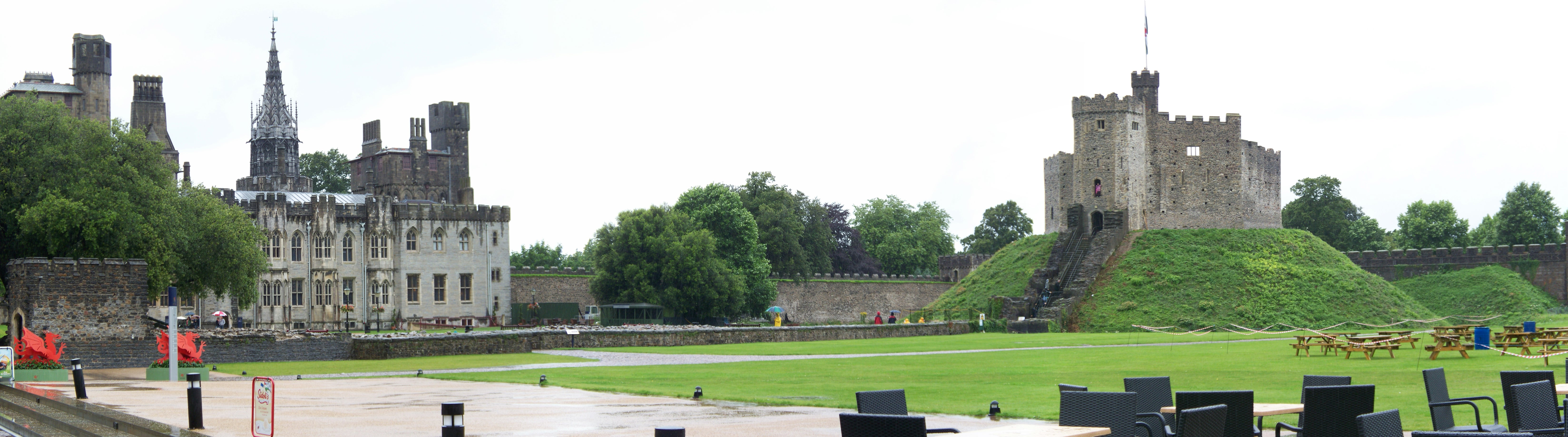 Zamek w Cardiff (panorama)